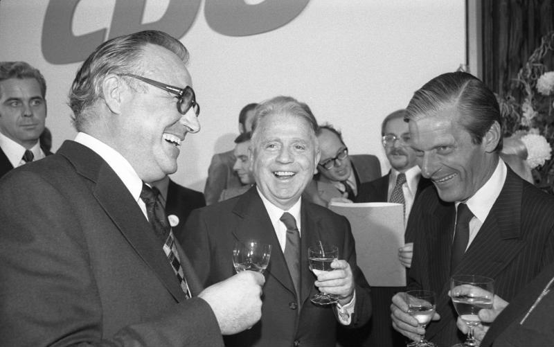 Empfang "25 Jahre Bundes-CDU" im Konrad-Adenauer-Haus, Bonn